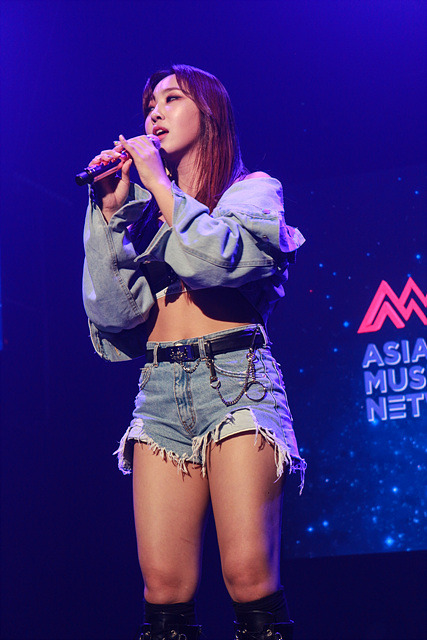 09월 26일 뮤콘 쇼케이스 MUCON Showcase 공민지(MINZY)